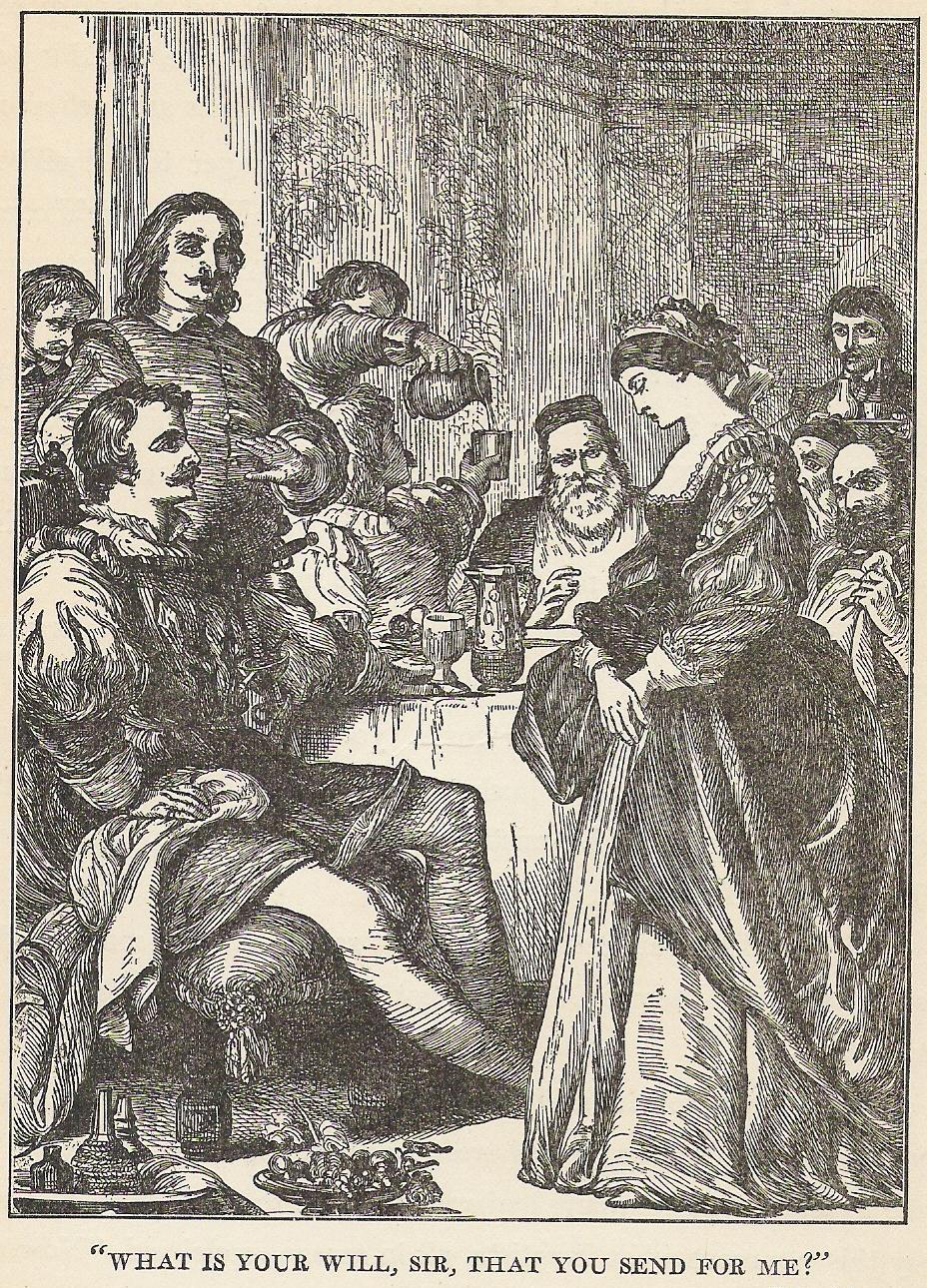 Illustration